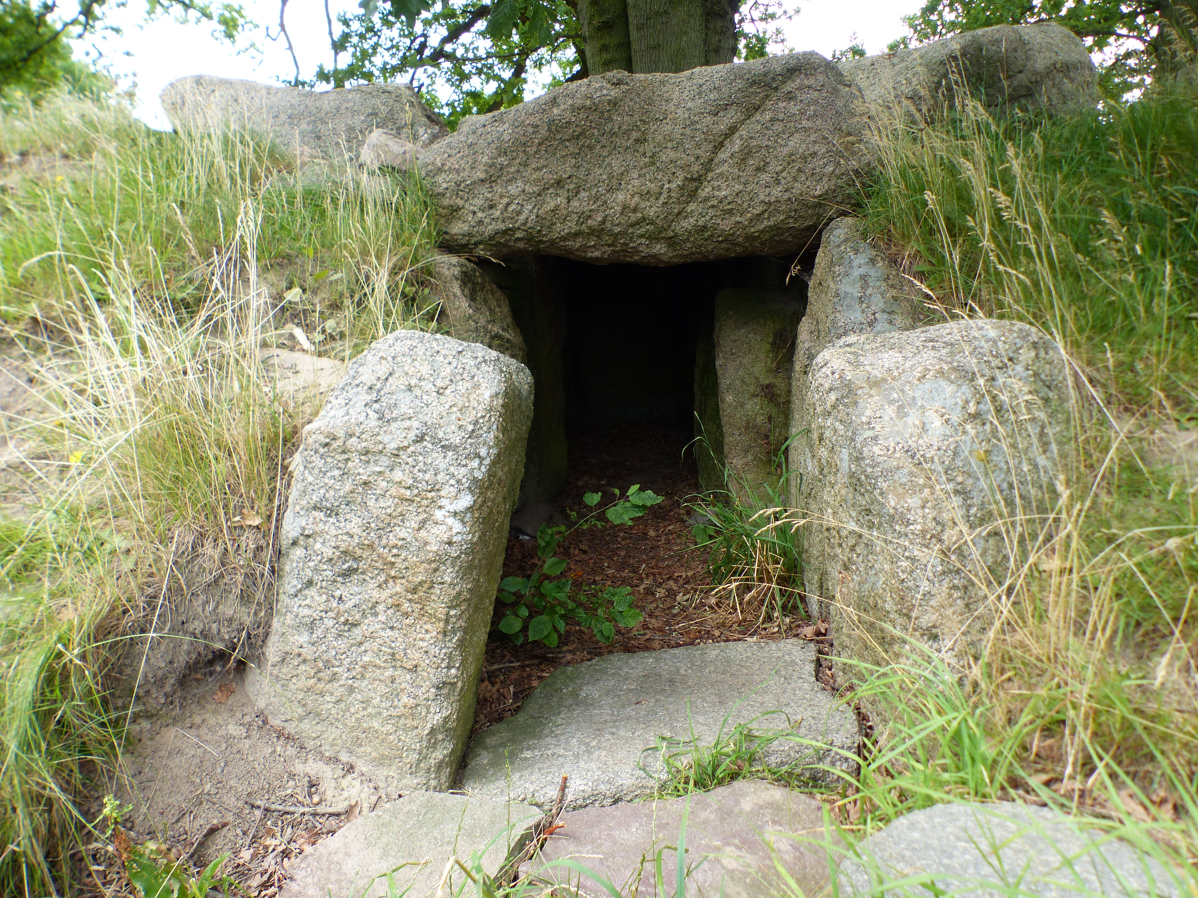 Hallebroendshoej (Grabhügel), Zugang zur Kammer, Bornholm